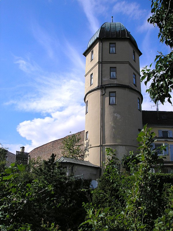 Stadtbefestigung Friedberg (Landkreis Aichach-Friedberg, Bayerisch-Schwaben). Der "Wasserturm" im Südwesten. Eigene Aufnahme, Jan. 2007 / Friedberg city walls (Bavaria, Germany). The "Watertower" in the south-west. Own photo, Jan. 2007